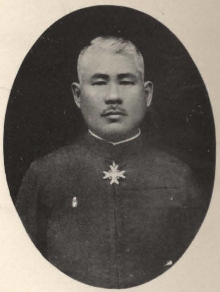 Bân-lâm-gú: 今川淵 Imagawa Fukashi